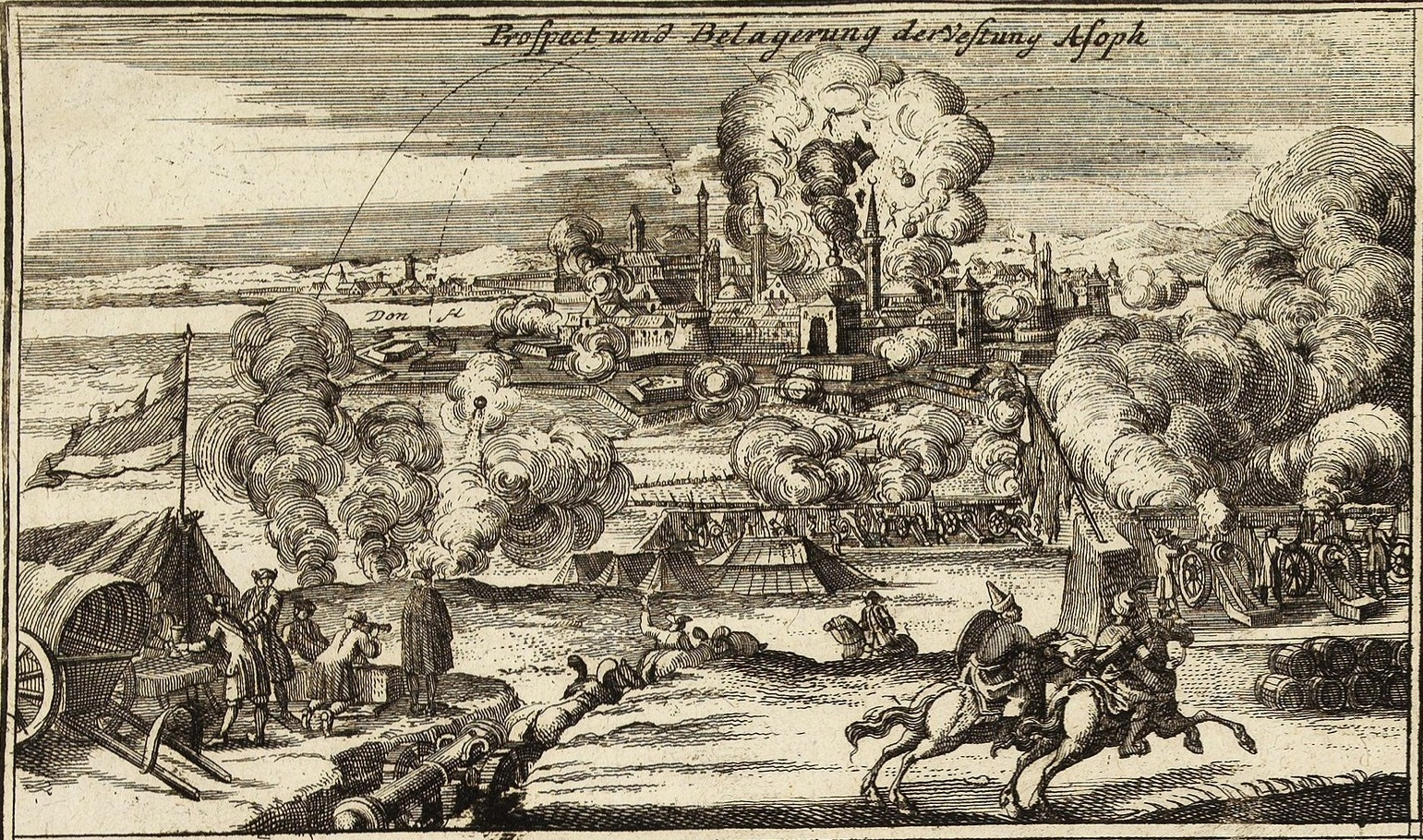 Изображение осады Азова русскими войсками в 1736 году